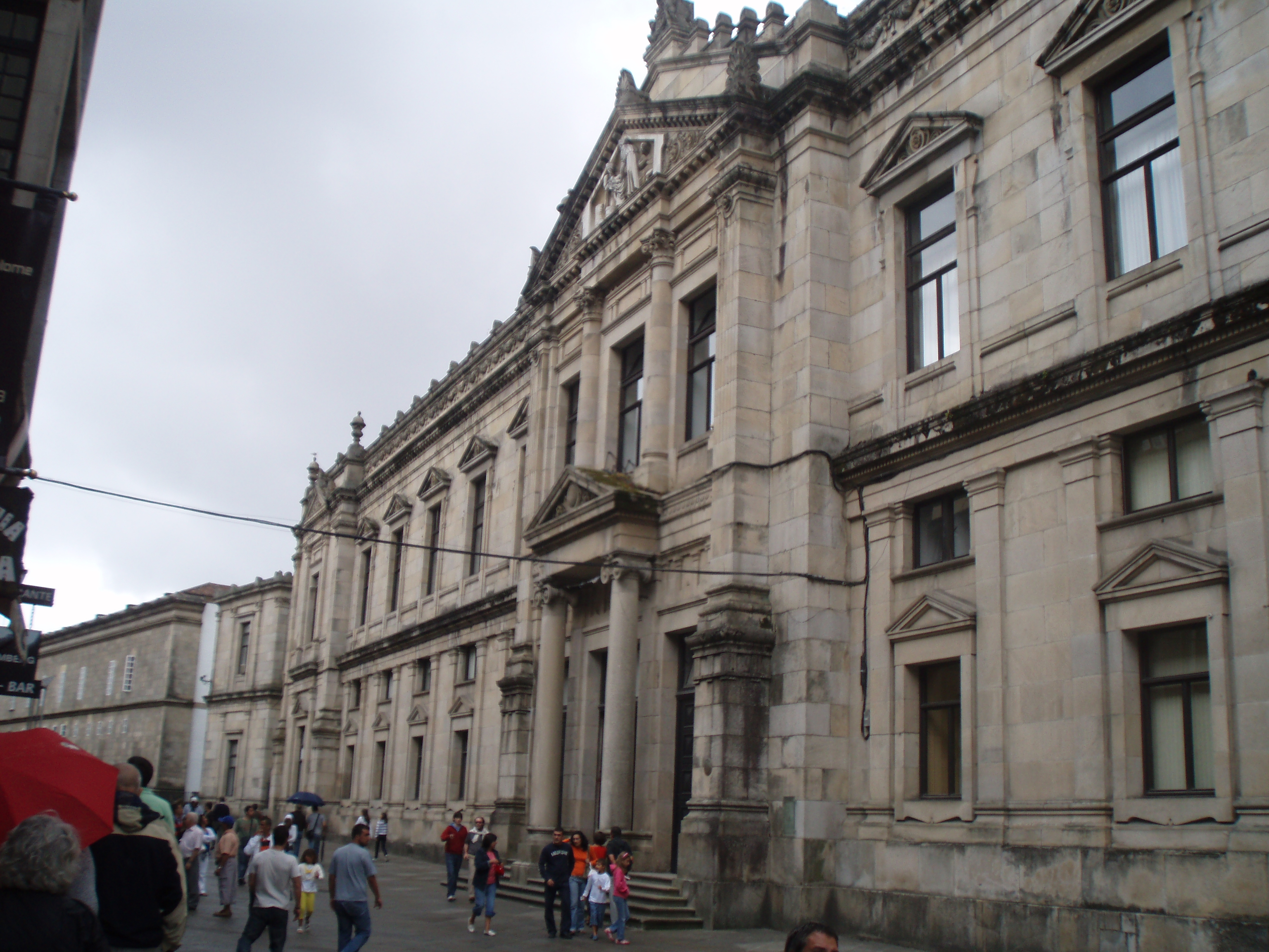 Vista de la Facultad de Medicina de Santiago de Compostela.